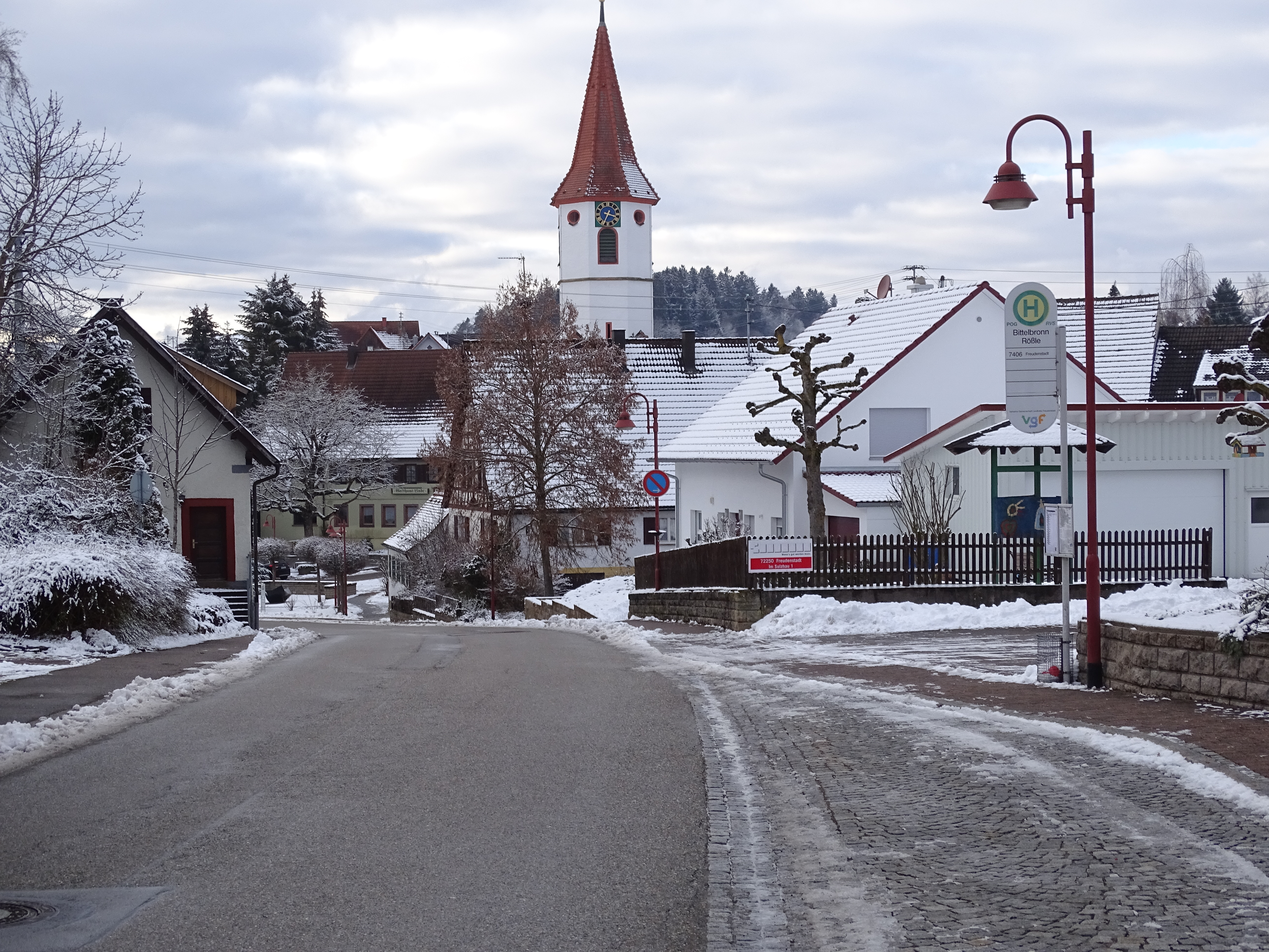 Aufnahmen von Bittelbronn (Horb)